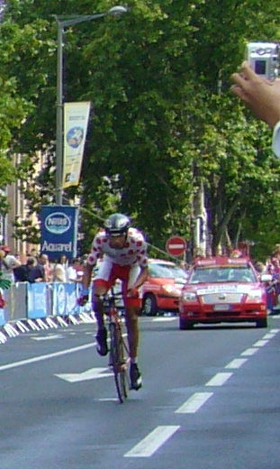 Le courreur cycliste colombien Juan Mauricio Soler Hernandes lors du contre la montre d'Albi du Tour de France 2007 Juan Mauricio Soler Hernandes during the 2007 Tour de France TT in Albi.